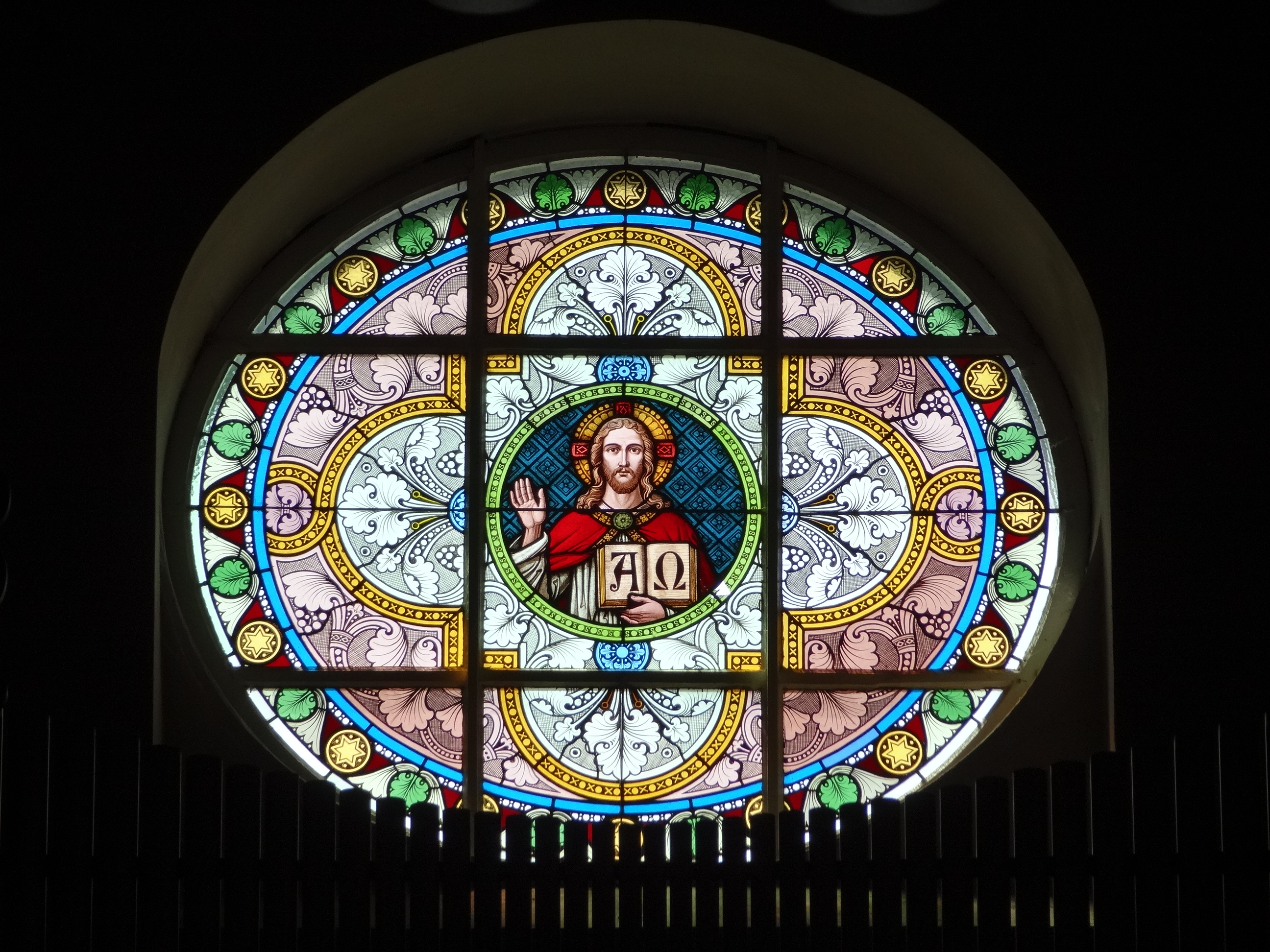 Evangelische Kirche Leihgestern